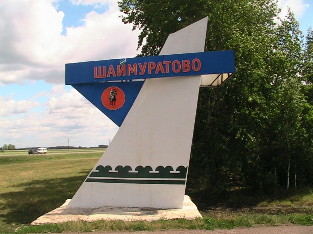 Указатель села Шаймуратово на трассе Уфа-Белорецк